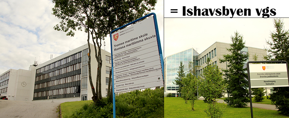 Ishavsbyen videregående skoles to skolesteder